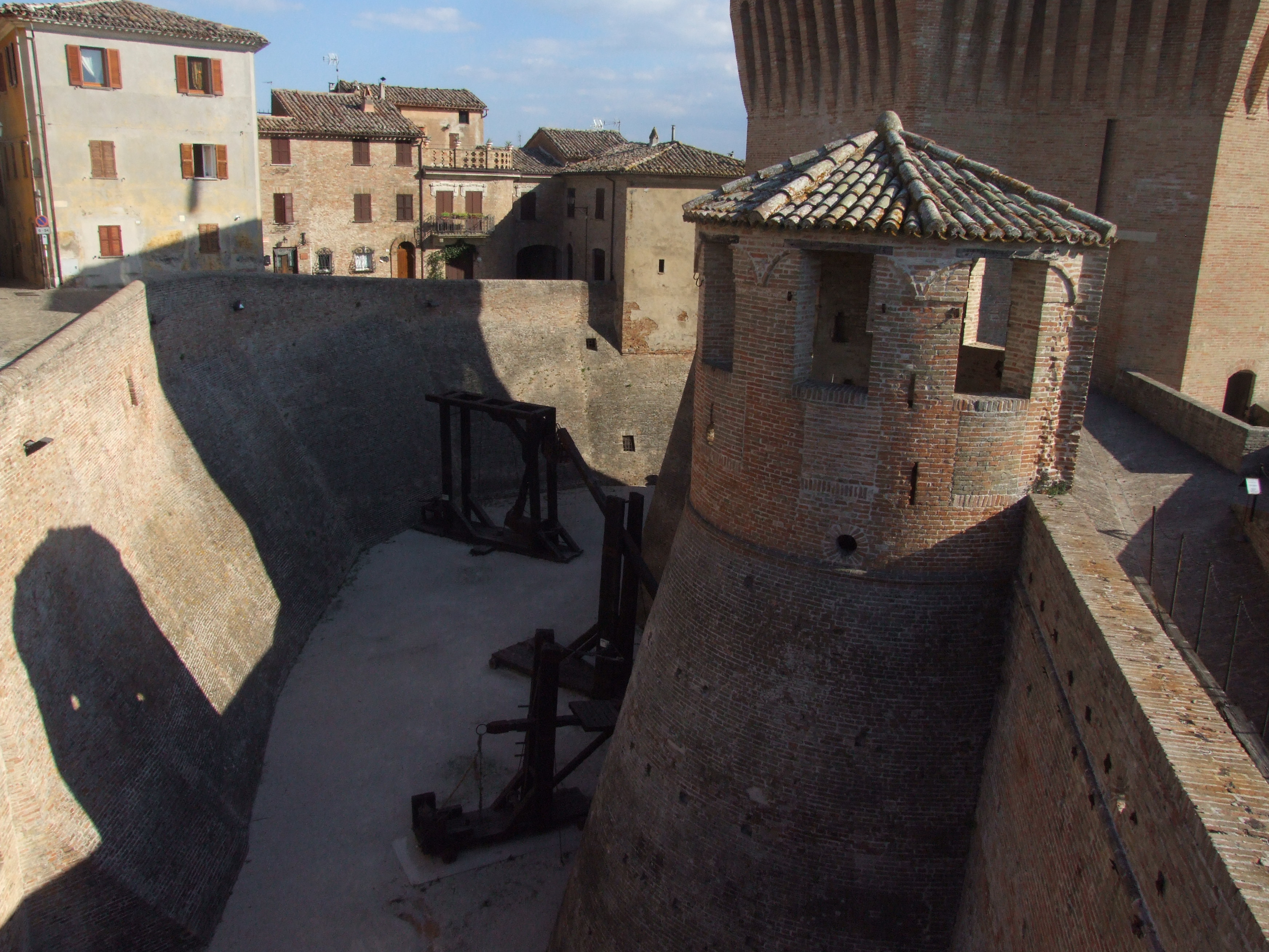 Fossato della Rocca Roveresca di Mondavio This is a photo of a monument which is part of cultural heritage of Italy.